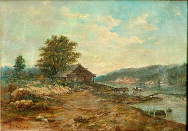 Горавский А.Г. Пейзаж с домиком у реки. 2-я половина XIX в.